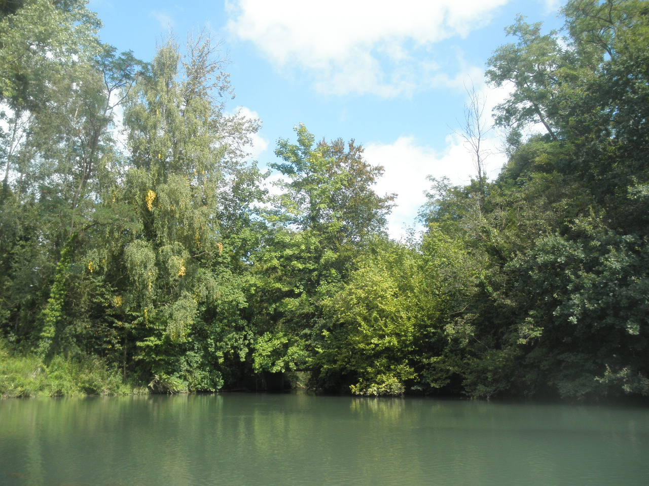 impreso de la natura parko Taubergießen